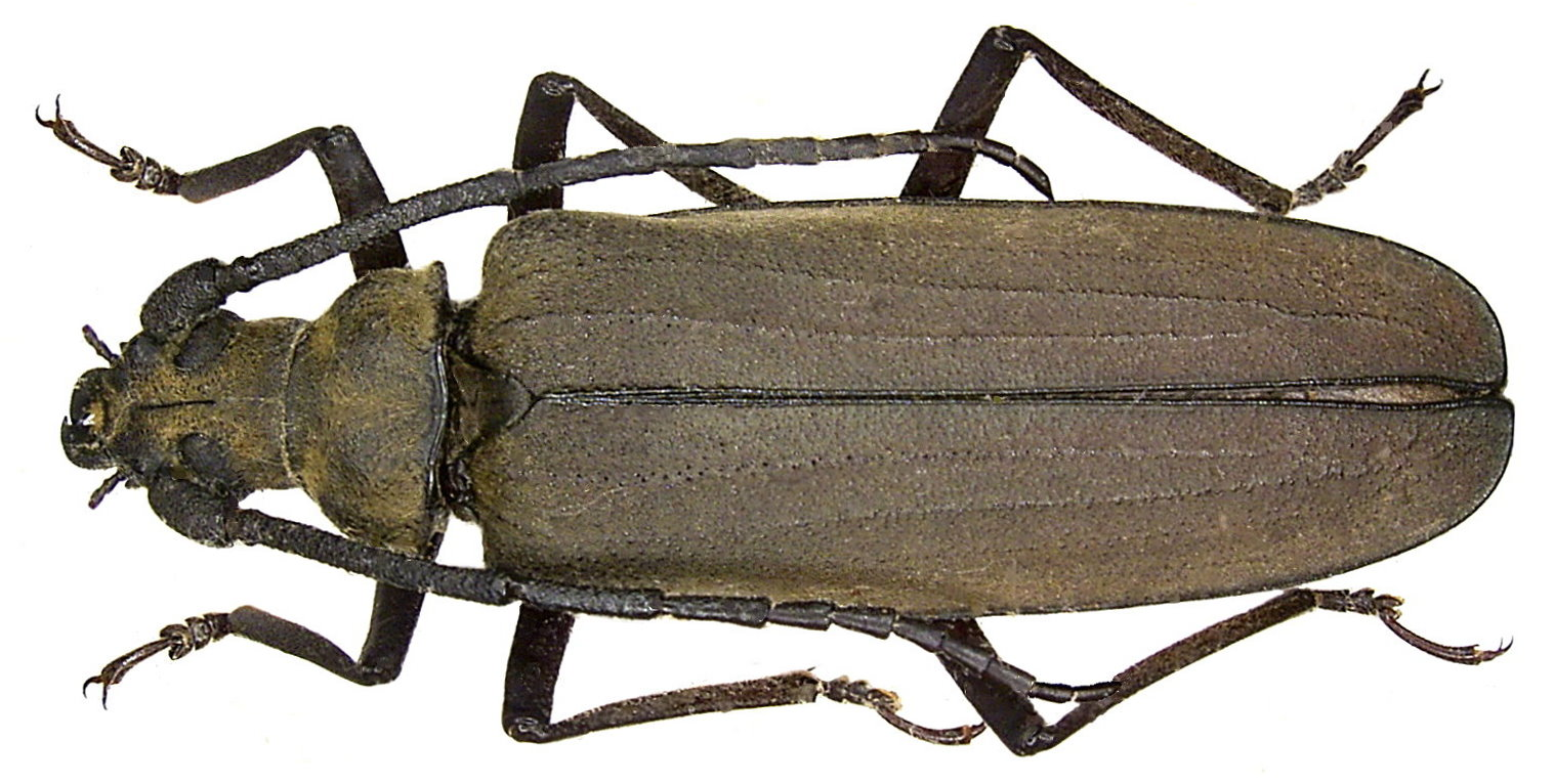 Familie: Cerambycidae Groesse: 43 mm Fundort: Vietnam, Yen Bai Prov., An Fu Country, 1996 det. A.Weigel Photo: U.Schmidt, 2006